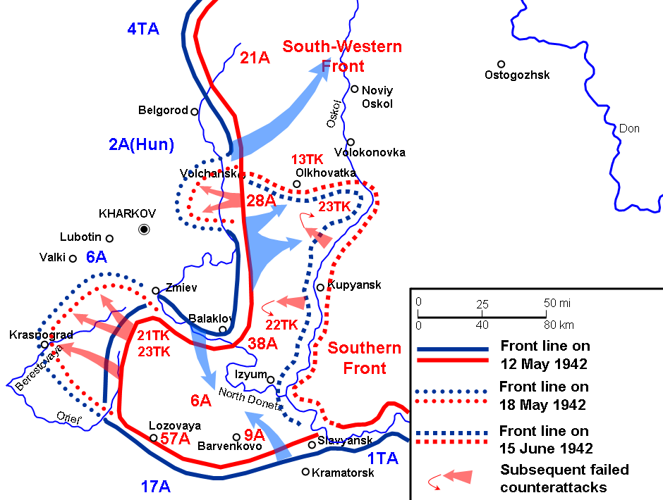 Map of 1942 Kharkov offensive Барвенковский котёл 1942 года. By Grafikm (AutoGRAF) Слика:Map of 1942 Kharkov offensive.png